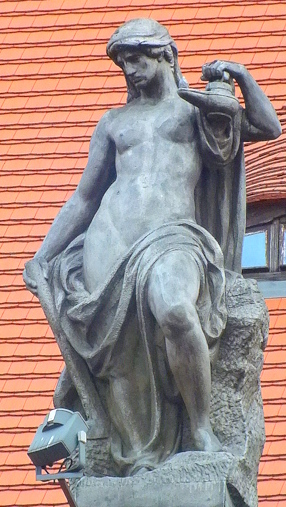 Figura Hestii na budynku Dyrekcji Kolei we Wrocławiu